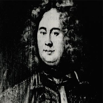 Karl Adam von Stackelberg (1669–1749)